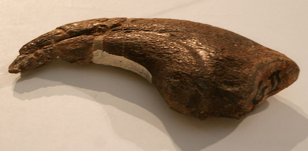 Gigantoraptor - 03